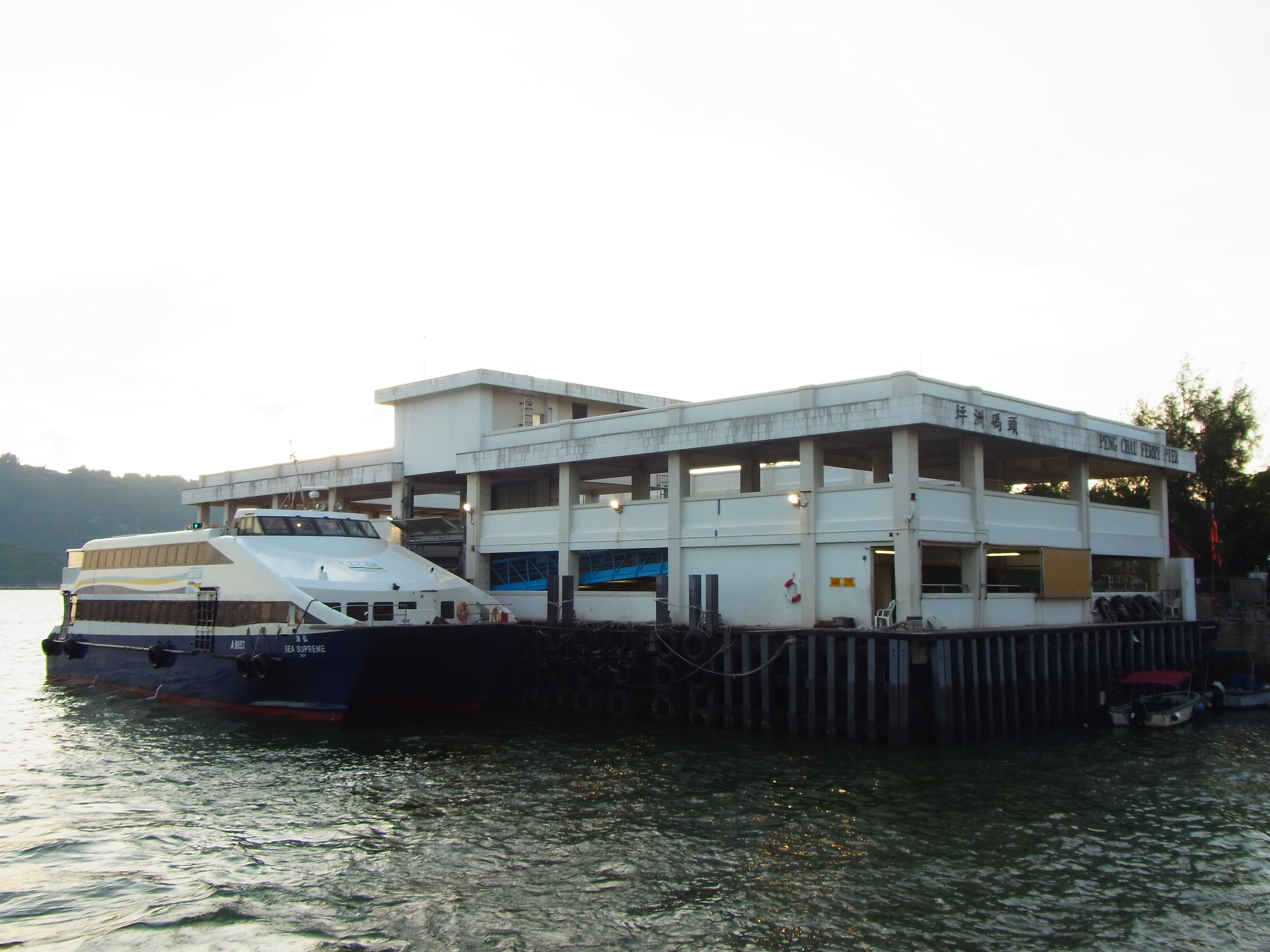 中文（香港）: 坪洲碼頭全境